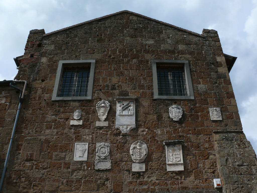 Loggetta del Capitano